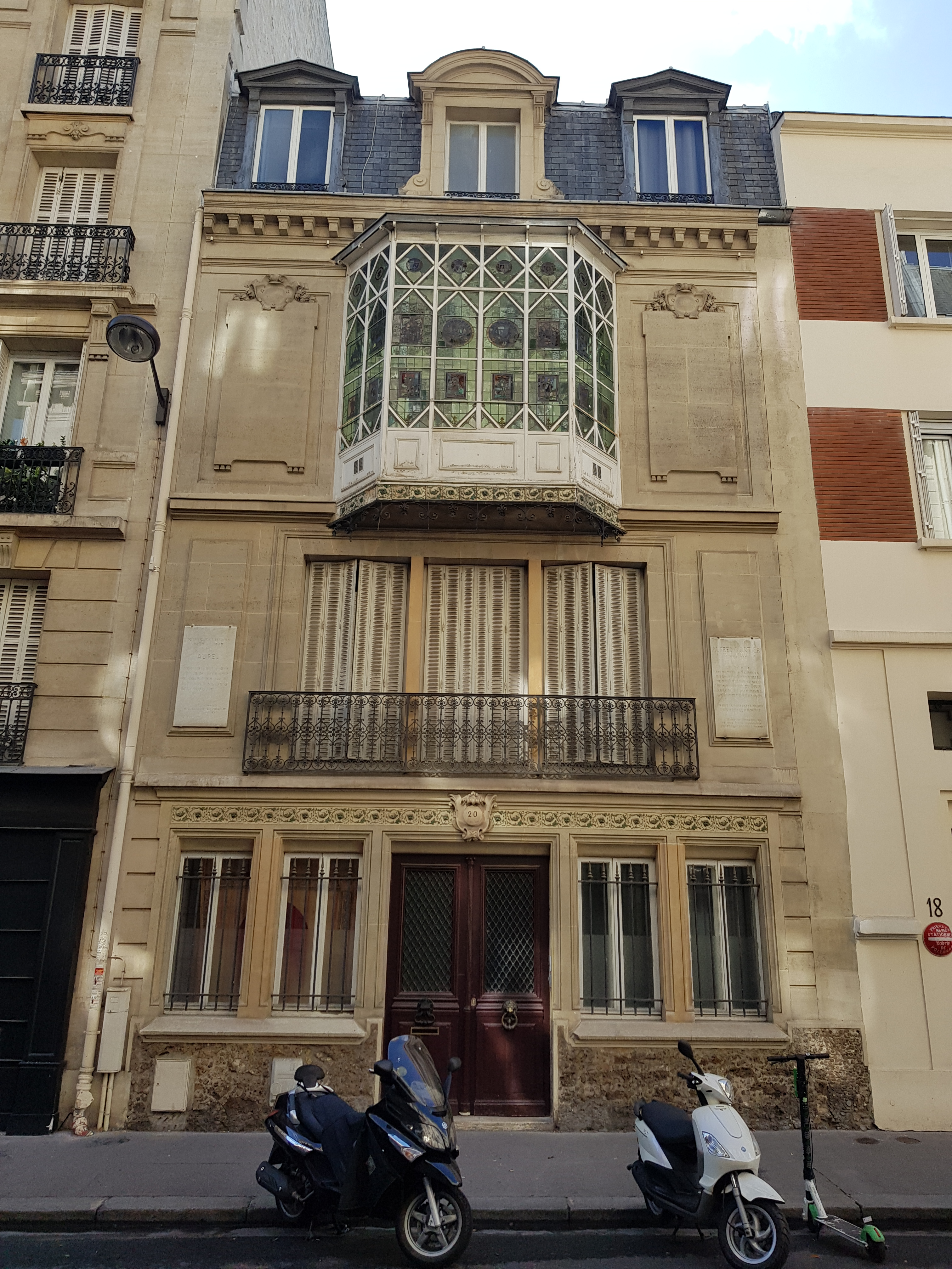 20, rue du Printemps, Paris 17e.